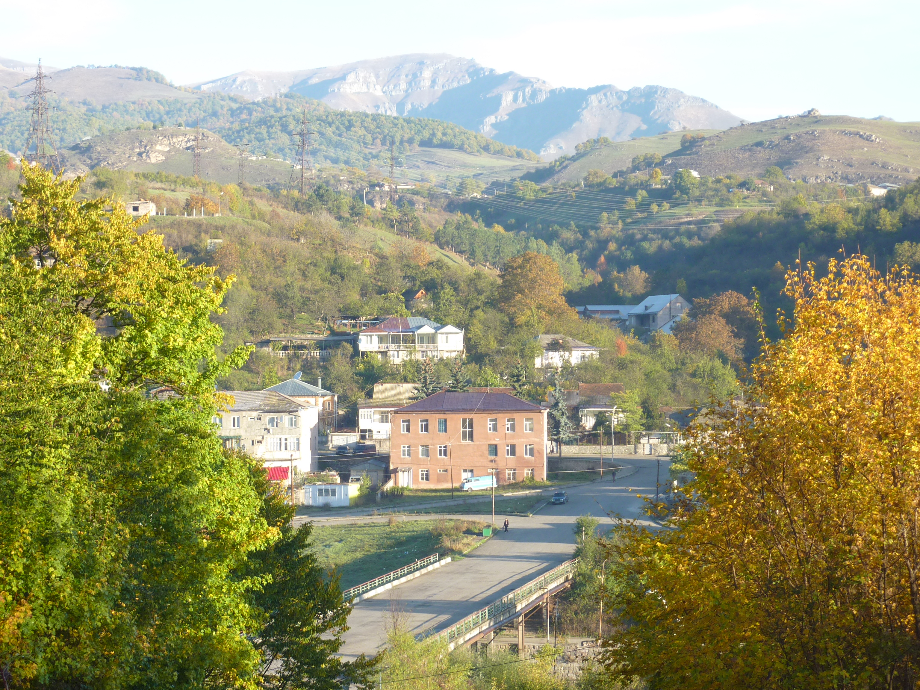 Vanadzor : la ville et son cadre naturel à l'automne